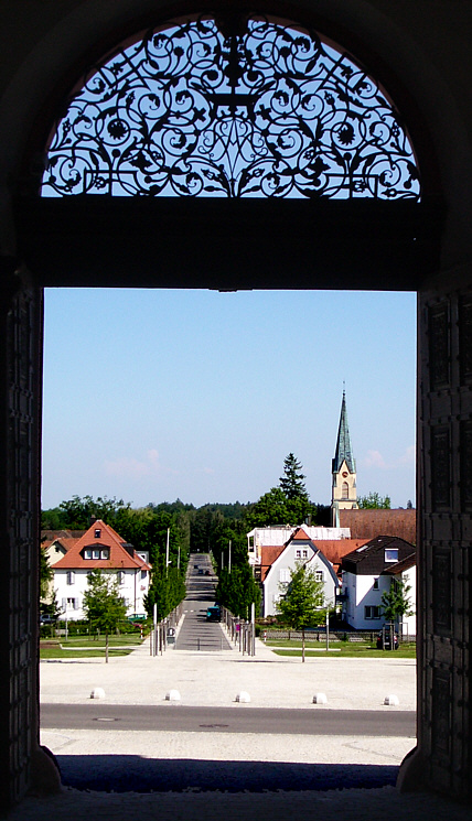 Altshausen: Marktplatz und Evangelische Kirche, Ansicht aus dem Torgebäude des Schlosses